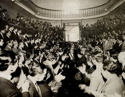 Augusto B. Leguia (presidente del Perú) saliendo de un discurso dado en la Casona de la Universidad de San Marcos.